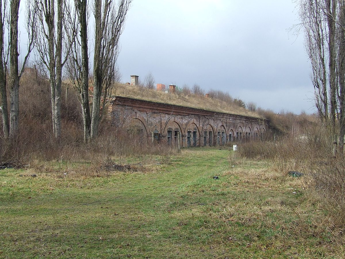 Fort Tscha Twierdzy Warszawa